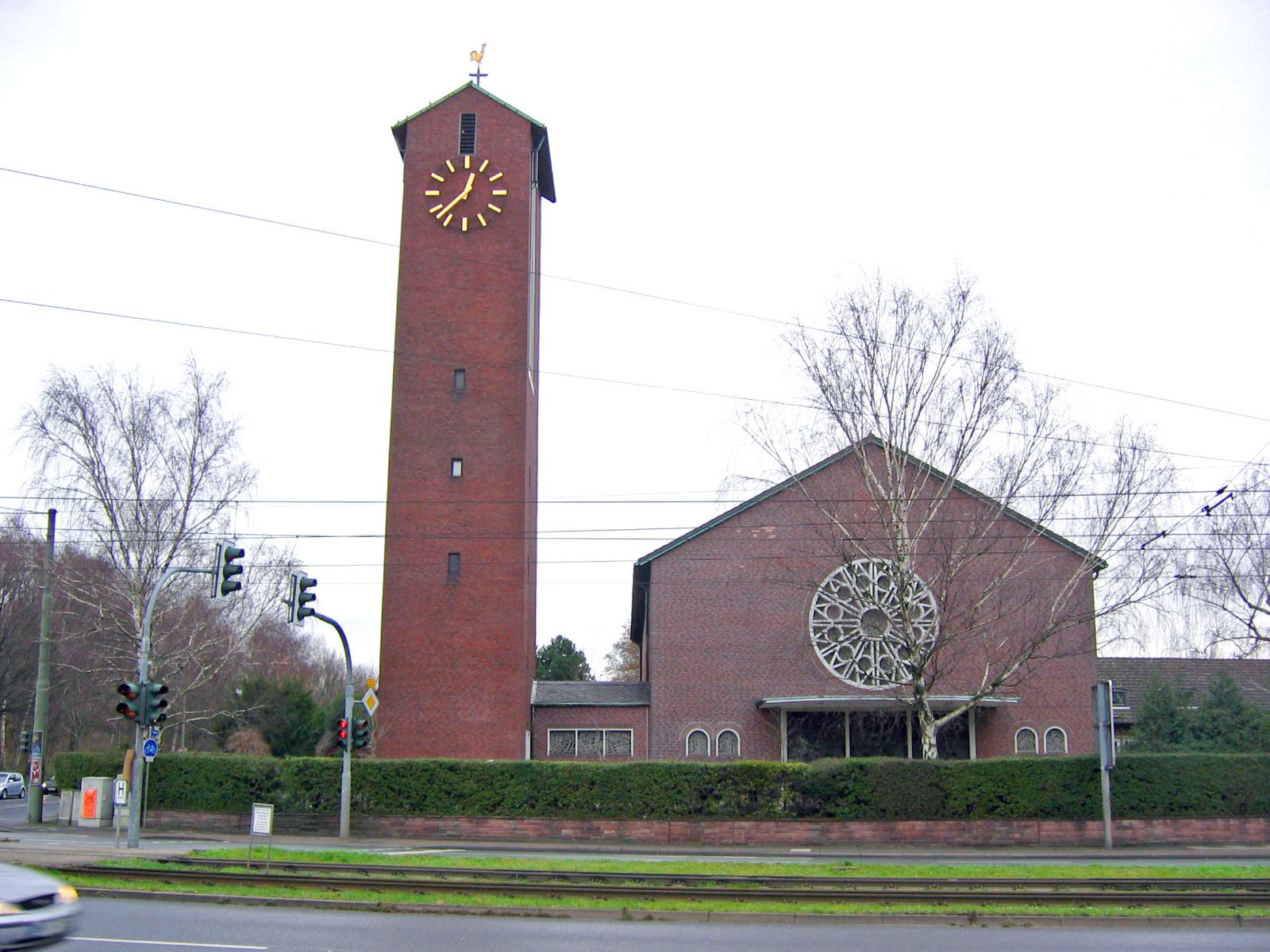 Kirche St. Nikolaus von Flüe Dorstener Straße / Poststraße Bochum-Hofstede, Germany